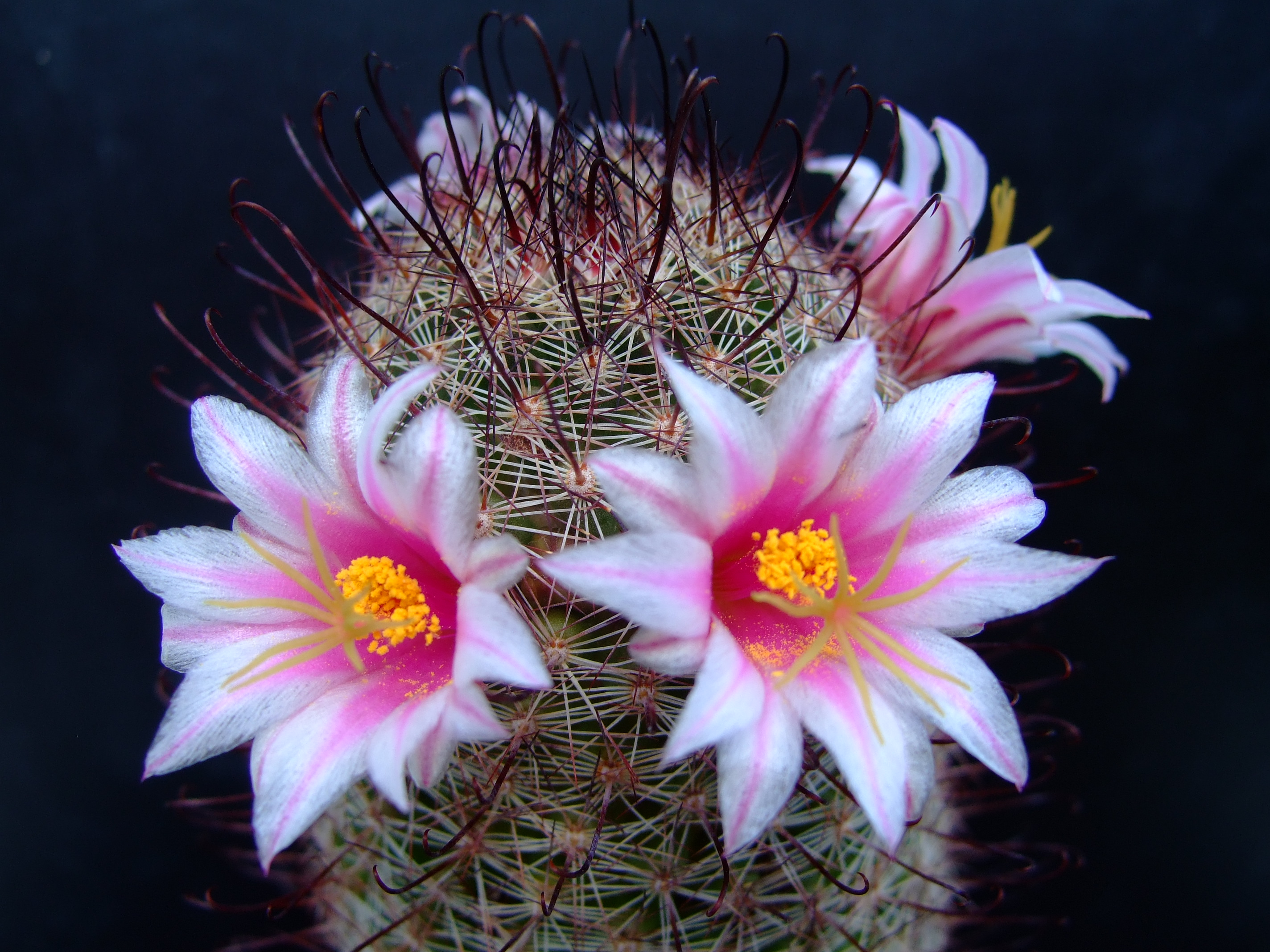 Mammillaria sheldonii (Syn. Mammillaria swinglei)